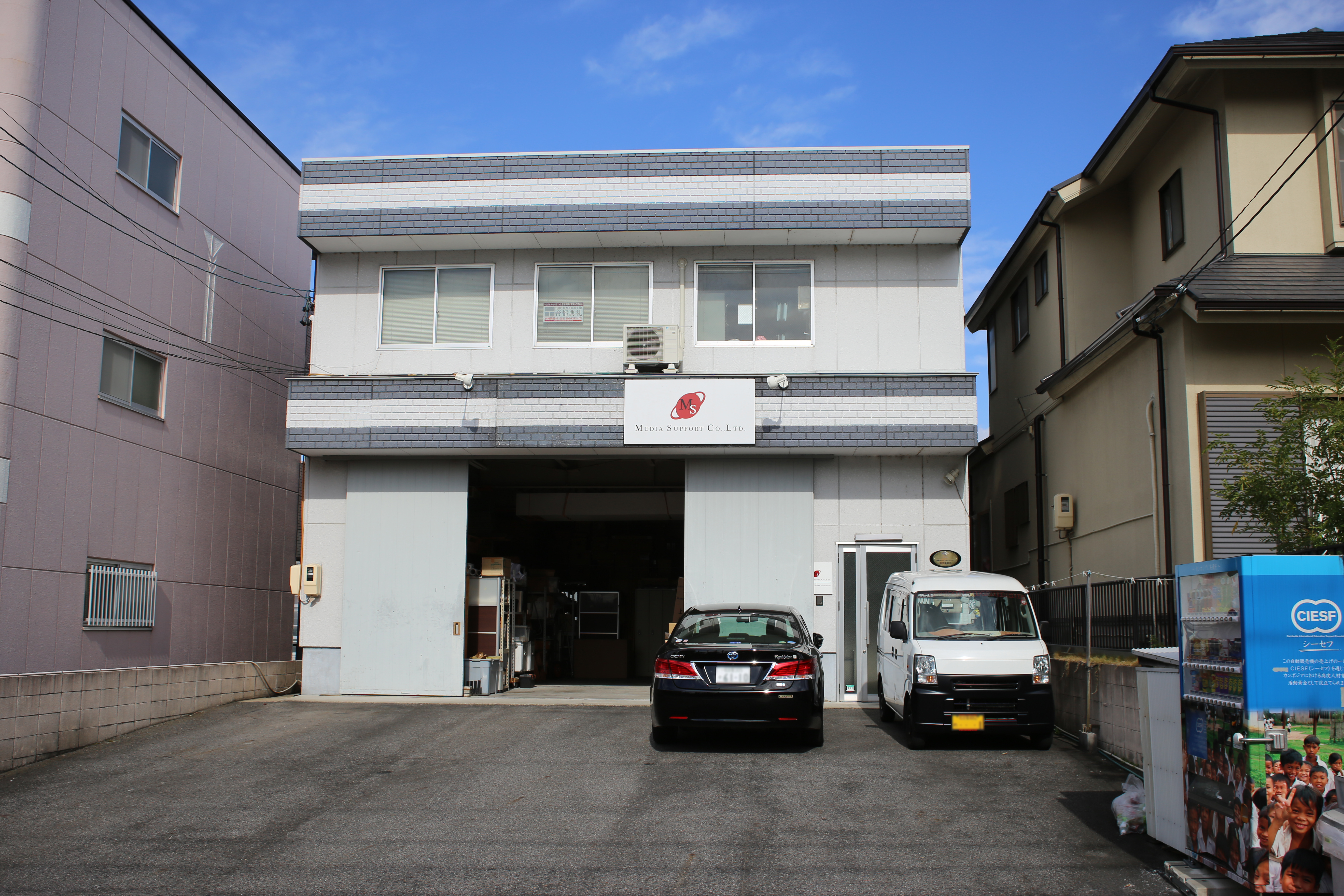 名古屋市天白区植田東のメディアサポート本社を南側公道より撮影。ただし、ナンバープレートにつき画像処理済。